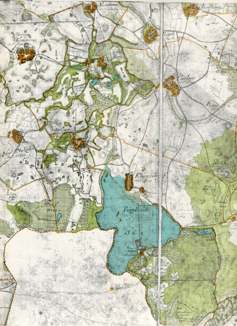 Karte vom Röggeliner See mit dem angrenzenden Teil des Fürstentum Ratzeburg, heute Landkreis Nordwestmecklenburg.